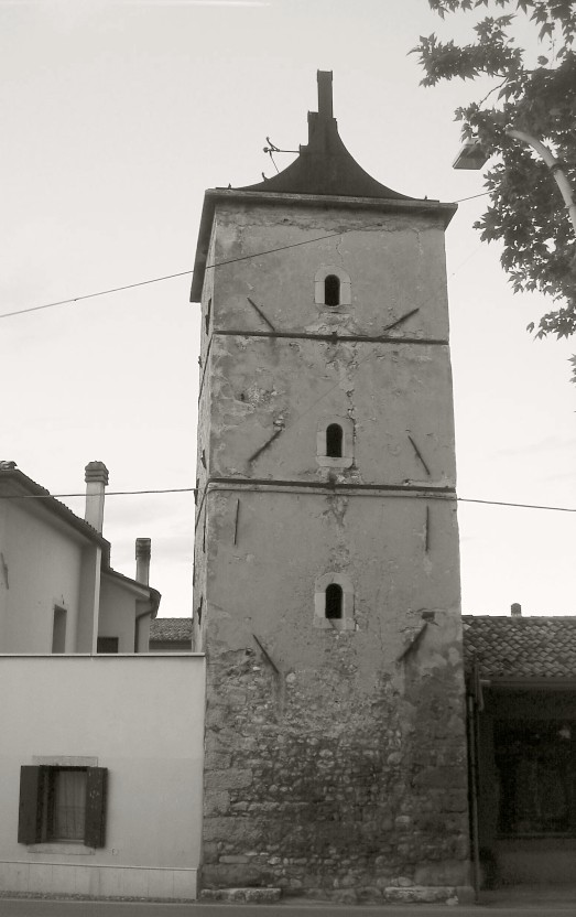 San Giacomo di Veglia (Vittorio Veneto, Treviso, Italia): torre campanaria; vecchia struttura mozzata, con campane esterne.